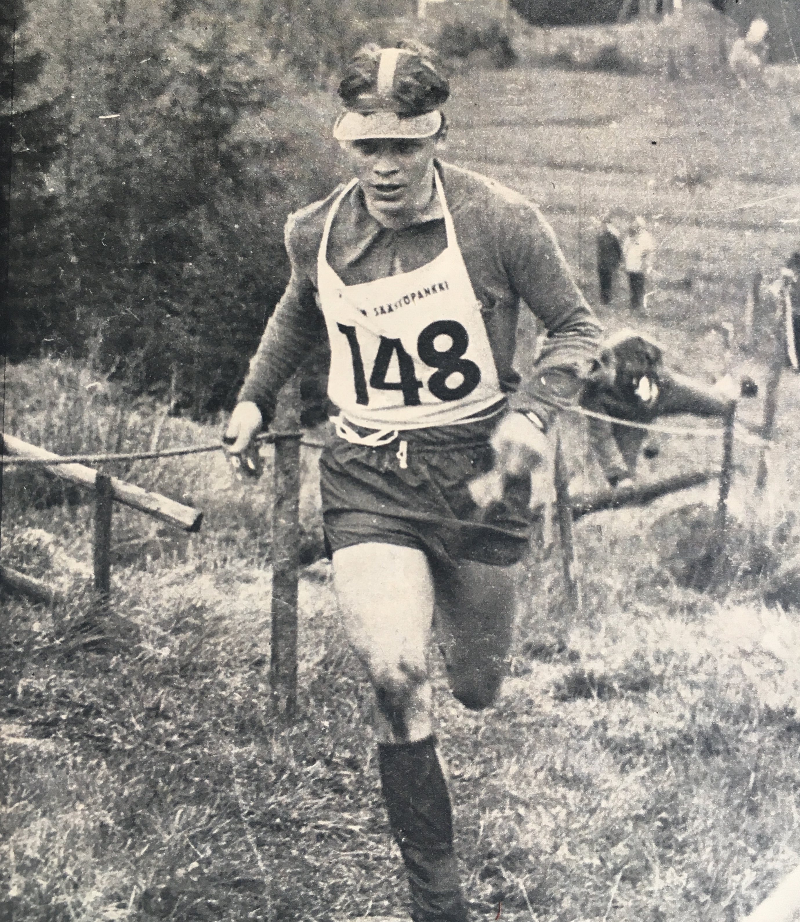 Pauli Reunamäki vuonna 1967